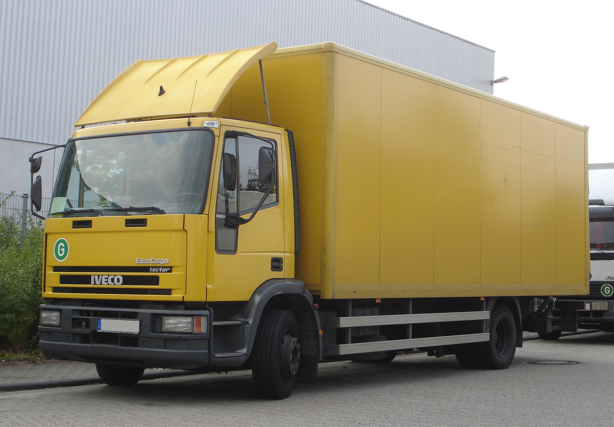 IVECO Euro-Cargo 120E28 Koffer-Lkw